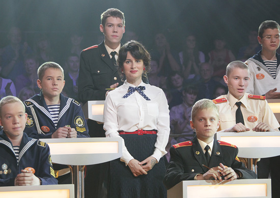 Совместный проект Министерства обороны Российской Федерации и телеканала «СТС» - «Самый умный кадет»